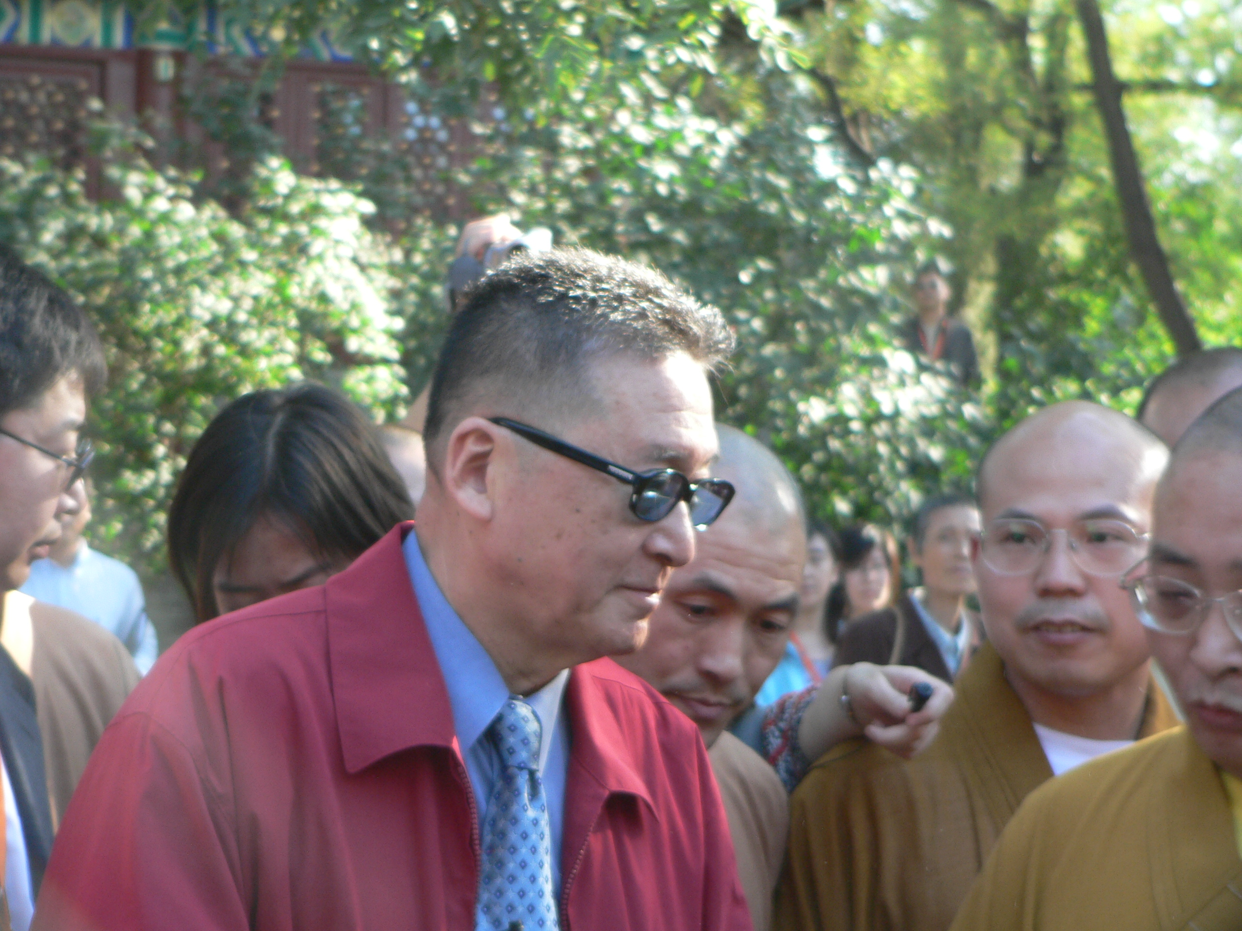 李敖遊覽法源寺。